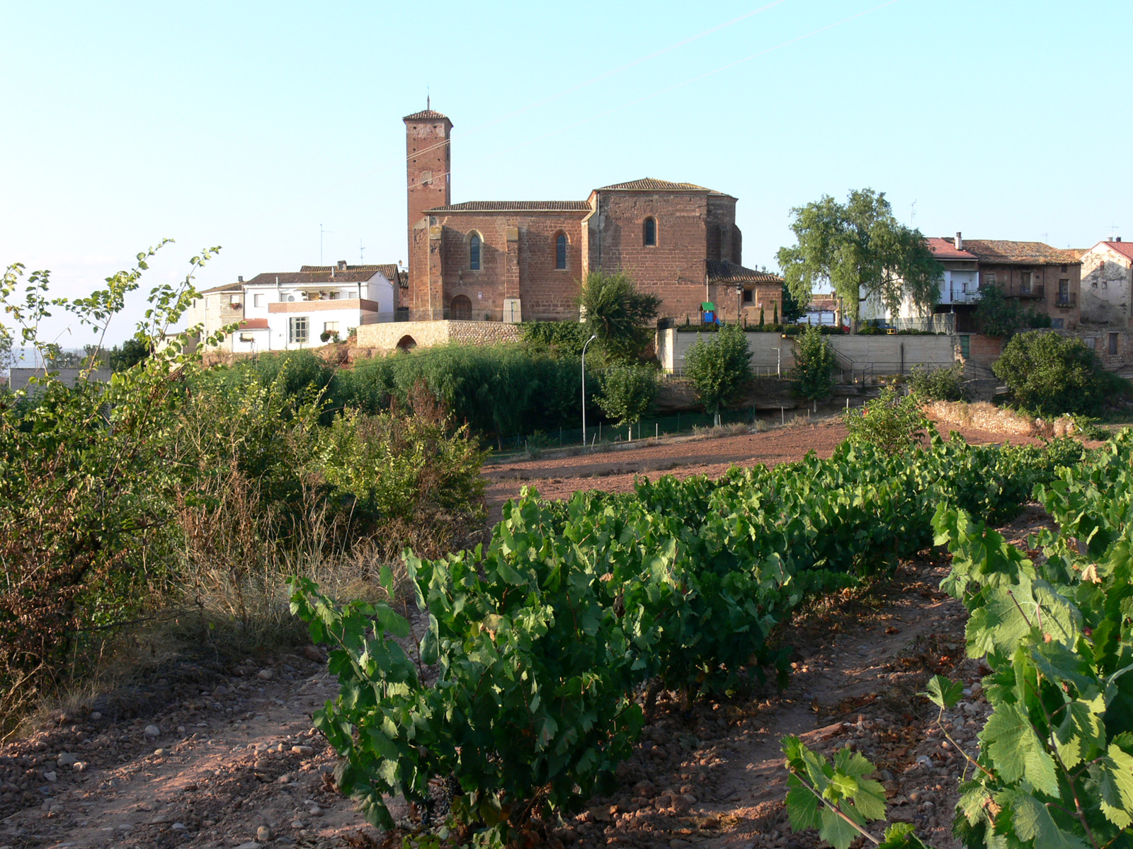 Alesón, municipio de La Rioja (España).